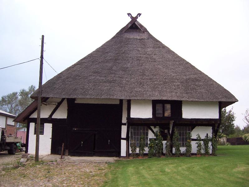 Fußwalmdach, historisches Bauernhaus (Hallenhaus) in Admannshagen